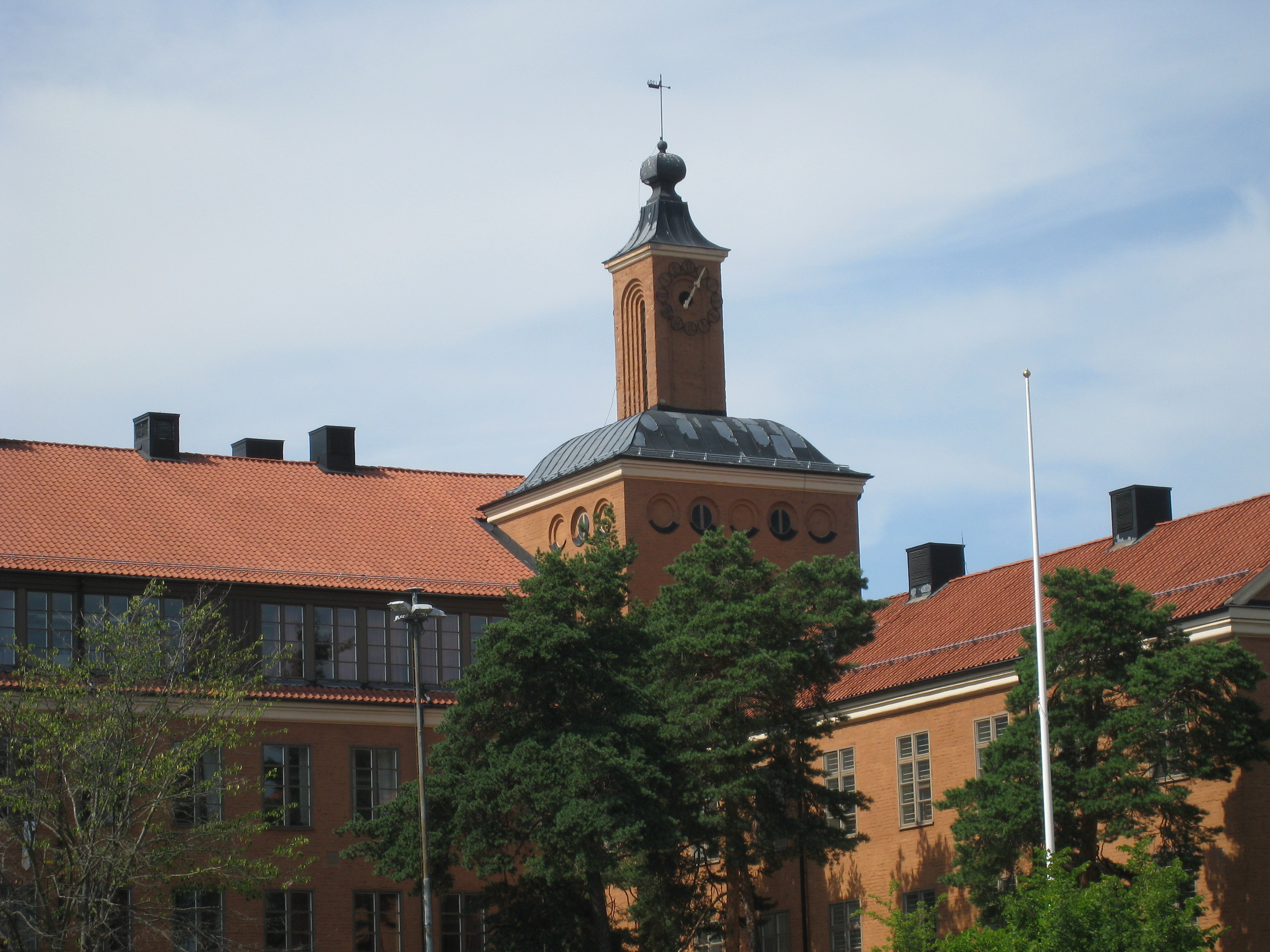 Alviksskolan, Tranebergsvägen 79, Bromma. Vy mot Tornskolan, som byggdes 1925. Arkitekt var Georg A. Nilsson.